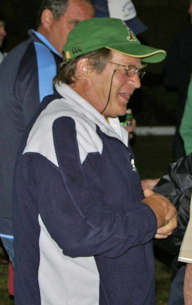 Tommy Raudonikis